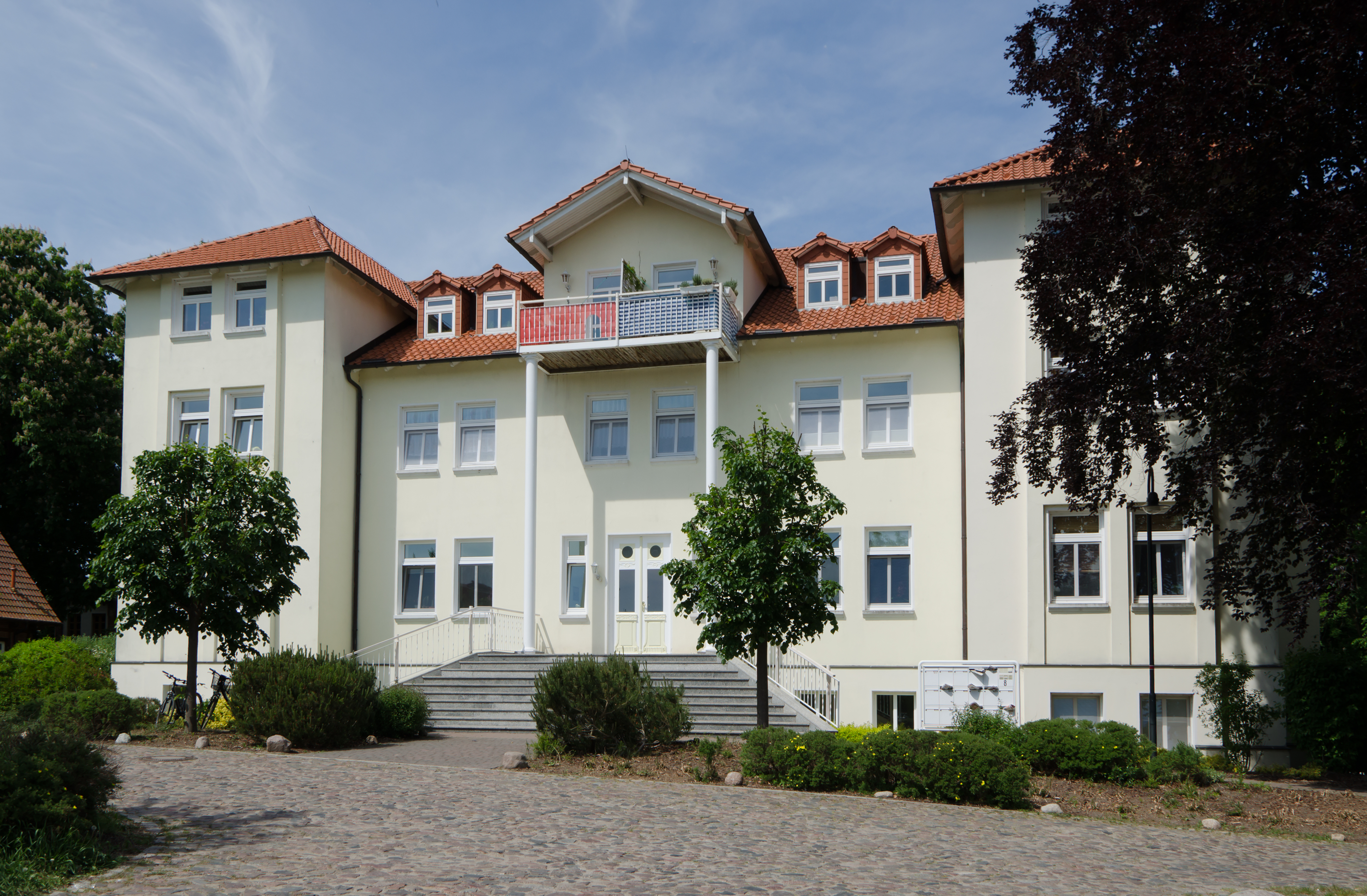 Gutsanlage Sildemow; ehemaliges Herrenhaus